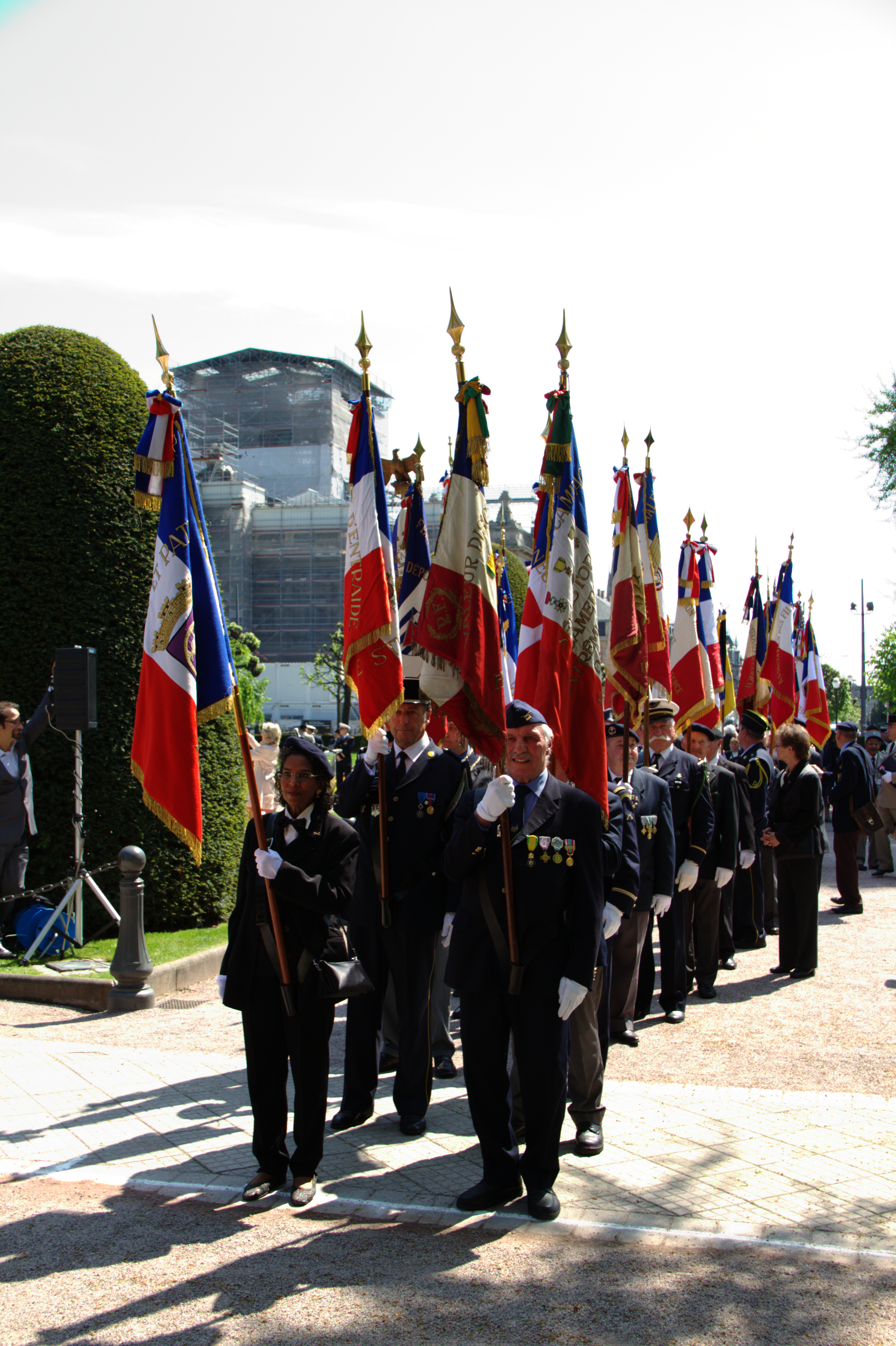 Cérémonie commémorative du 8-mai-1945 Strasbourg, place de la République 8 mai 2013